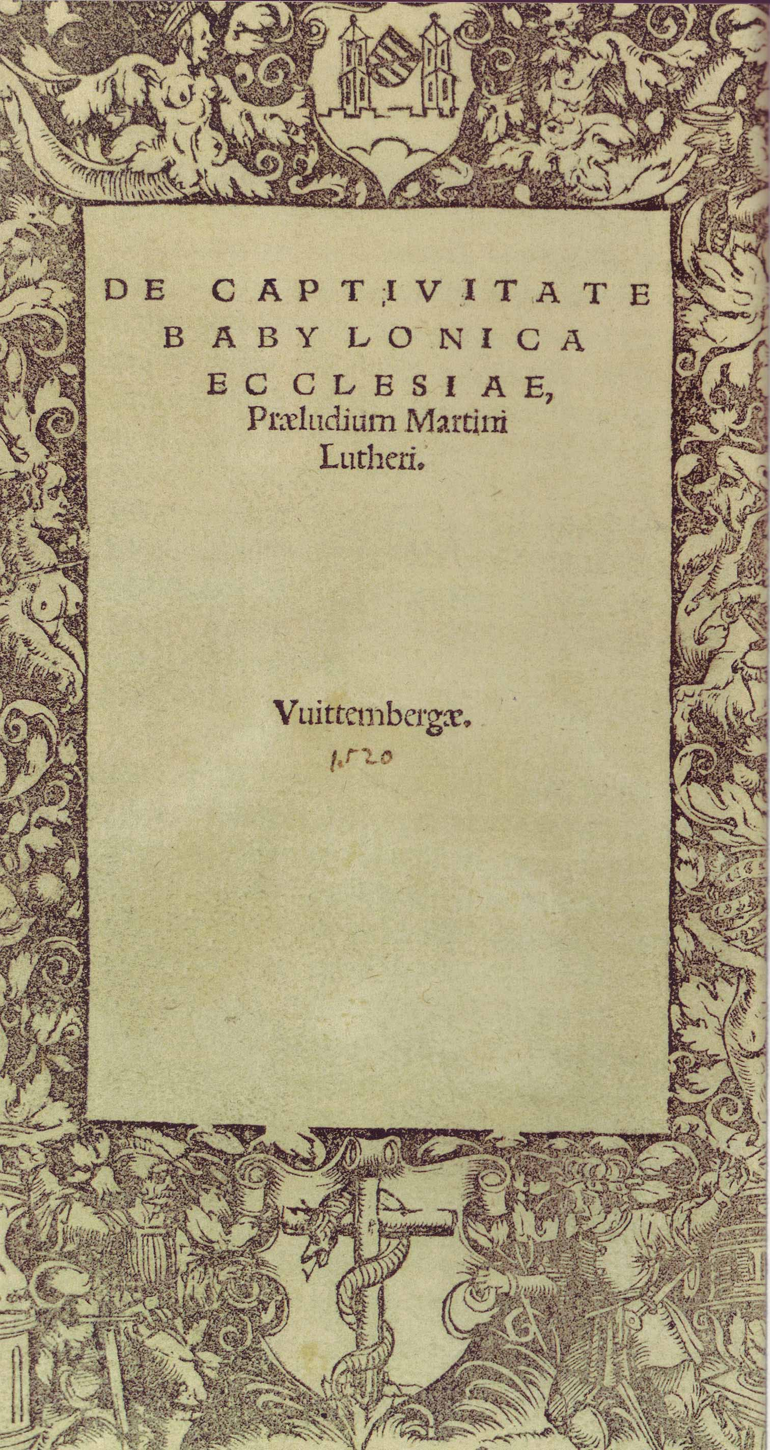 Titelblatt der Schrift Luthers "De captivitate Babylonica ecclesiae praeludium" Erschienen : Vuittembergæ, [1520], Melchior Lotter der Jüngere